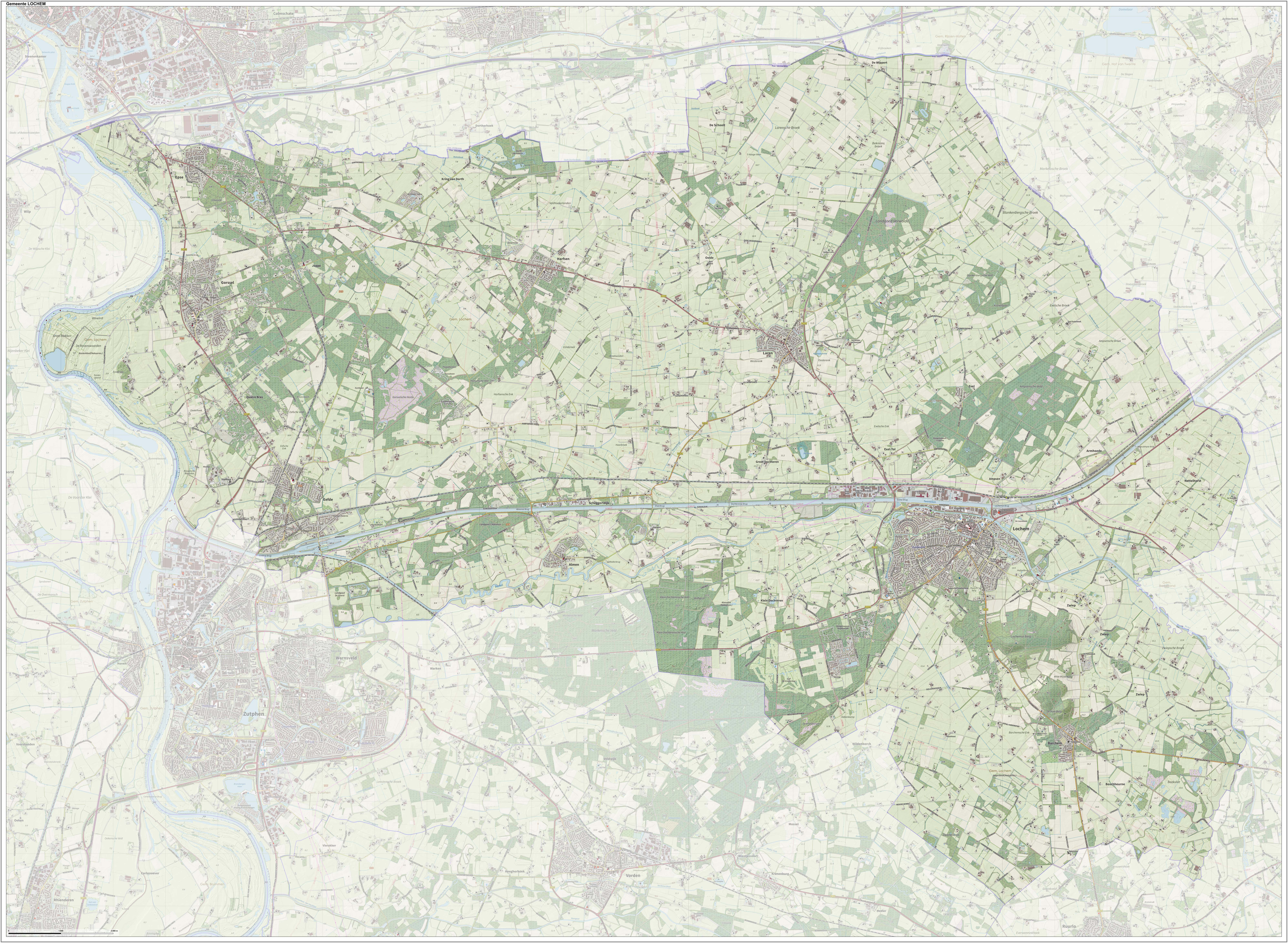 Topografische gemeentekaart. Resolutie: 400 pixels/km. Kaartbeeld samengesteld uit de open geodata van de Top10NL en Top25namen (Kadaster), Creative Commons-BY licentie. Gebouwvlakken uit open geodata BAG extract. Wegen uit de OpenStreetMap, OpenStreetMap community. Reliëfschaduw uit de Actuele Hoogtekaart AHN2. Samenstelling en kleurenschema: Jan-Willem van Aalst, met QGIS. Zie ook de Legenda.